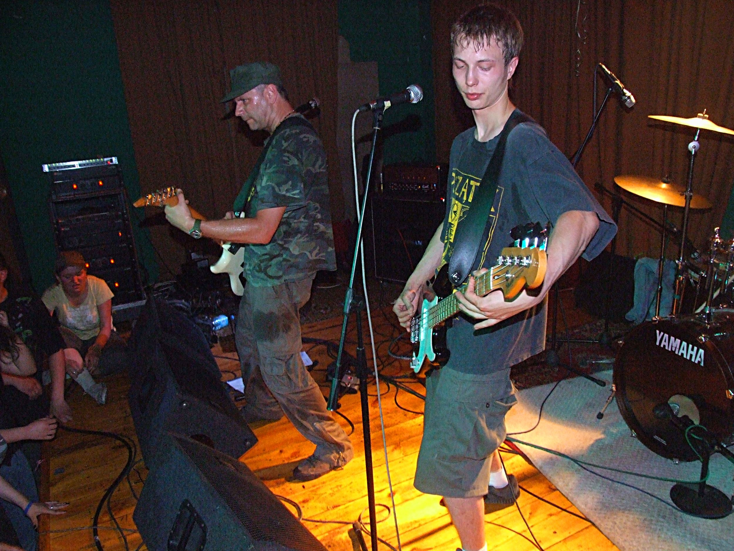 koncert zespołu The Bill w "Muzycznej Aptece" w Białej Podlaskiej